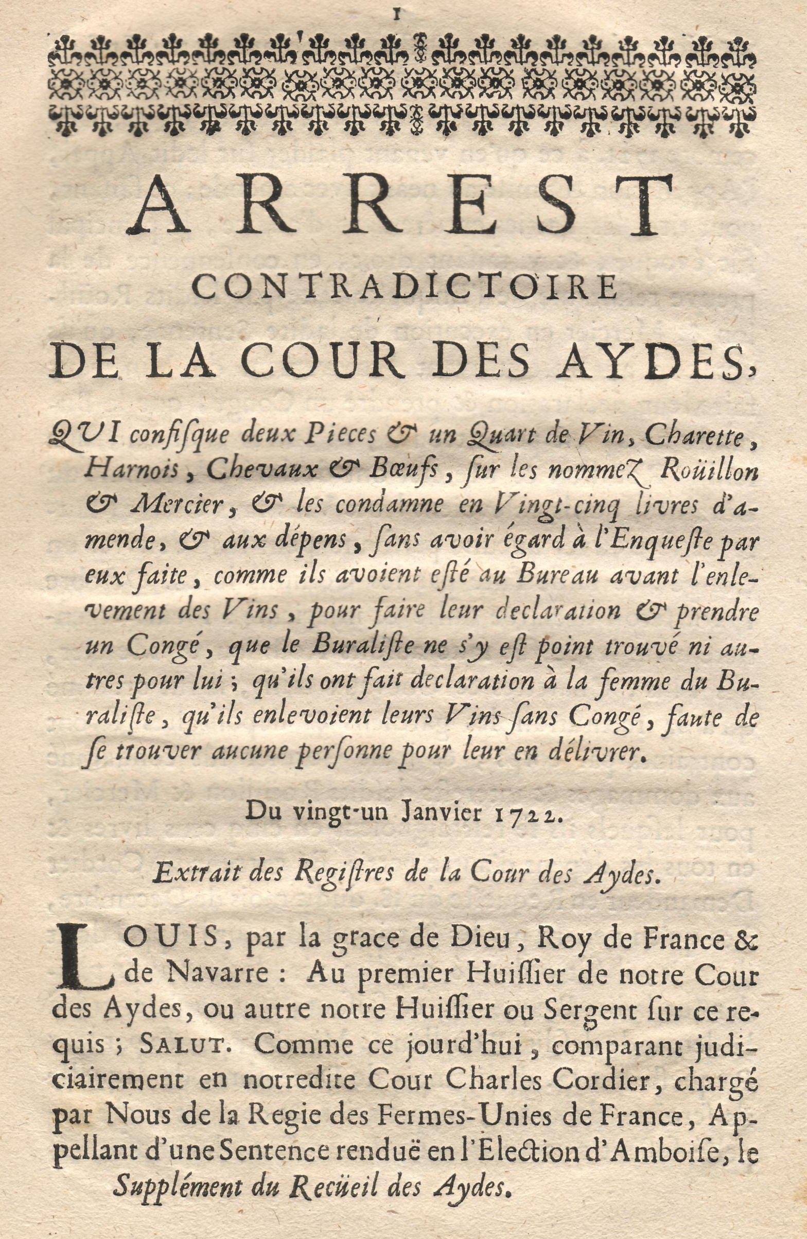 Arrêt de la Cour des Aydes de Louis XV concernant une absence de congé (taxe) sur un transport de vin à Amboise en 1722